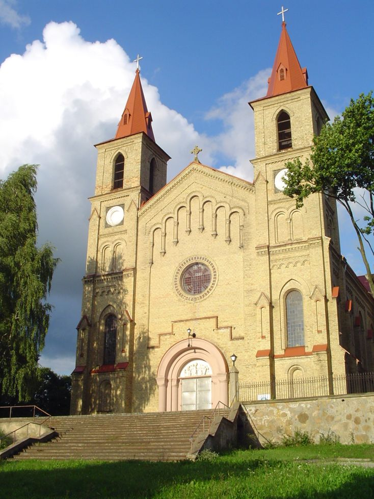 Church in Dąbrowa Białostocka